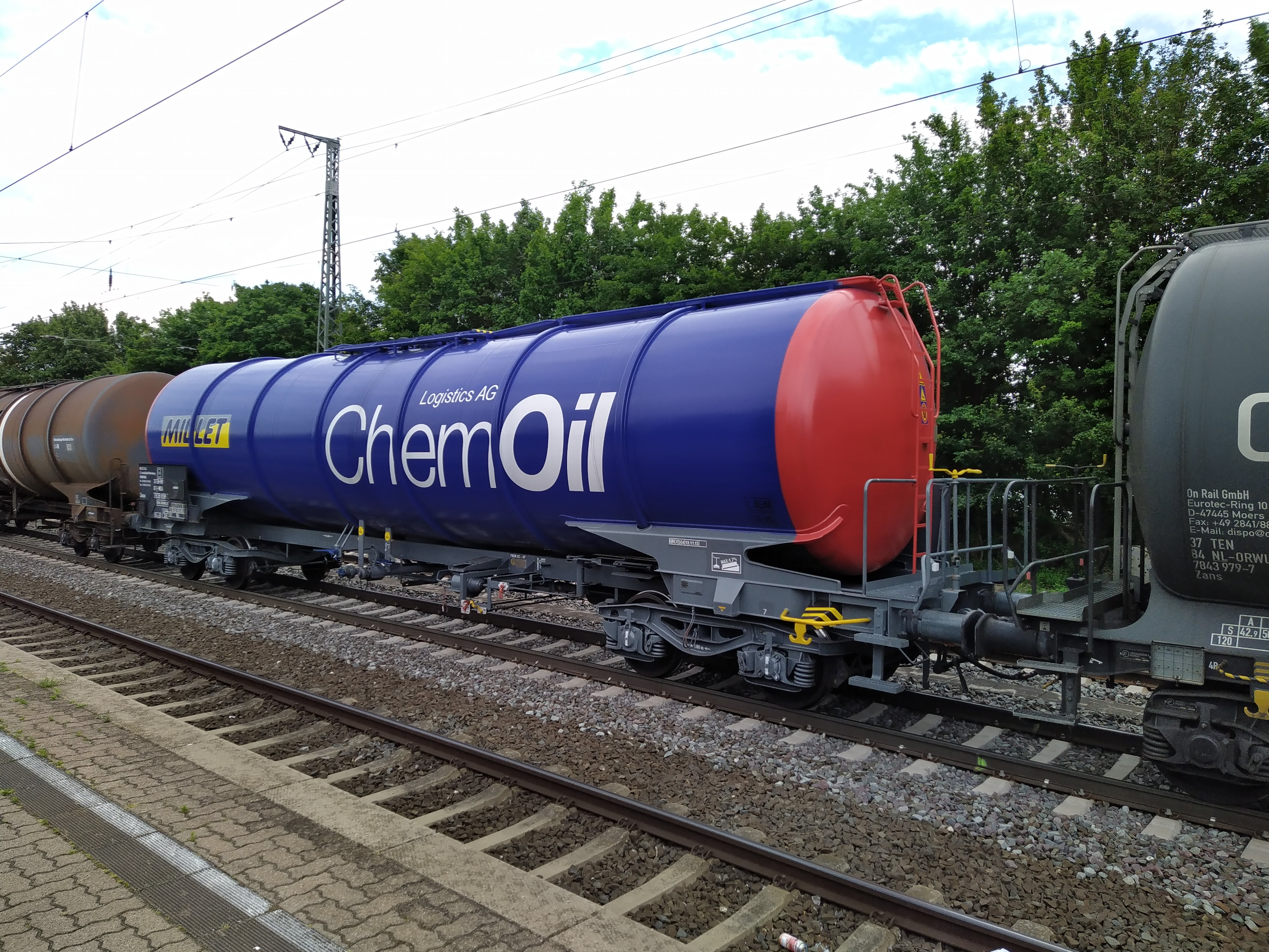 ChemOil Kesselwagen bei Durchfahrt in Wunstorf